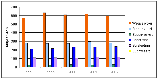 bron Adviesdienst Verkeer en Vervoer